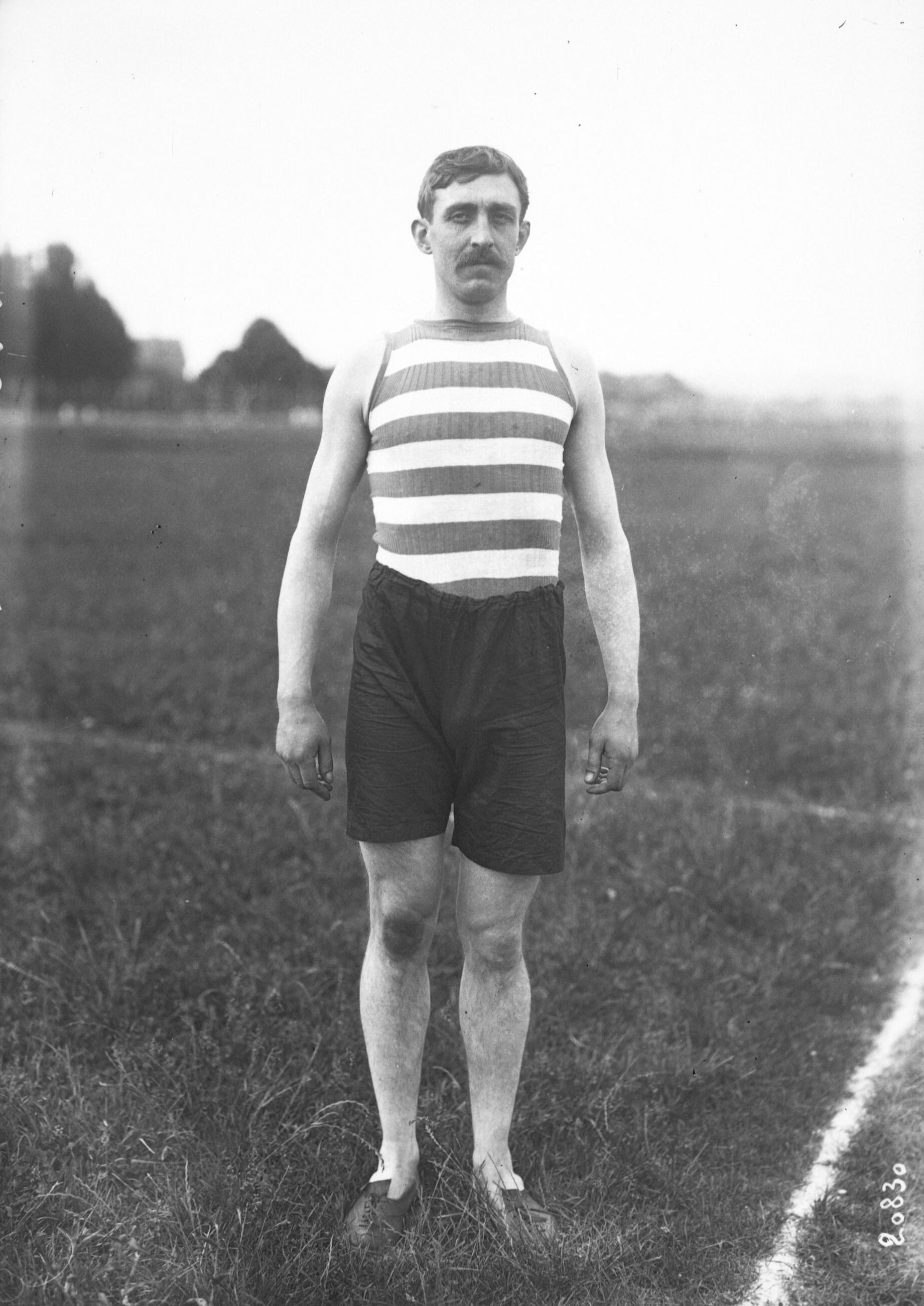 26-5-12, Colombes, Jardin [vainqueur du saut en longueur sans élan] : [photographie de presse] / [Agence Rol]